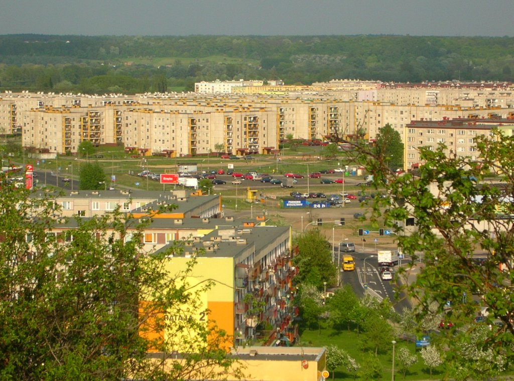 Widok ze Zbocza Fordońskiego